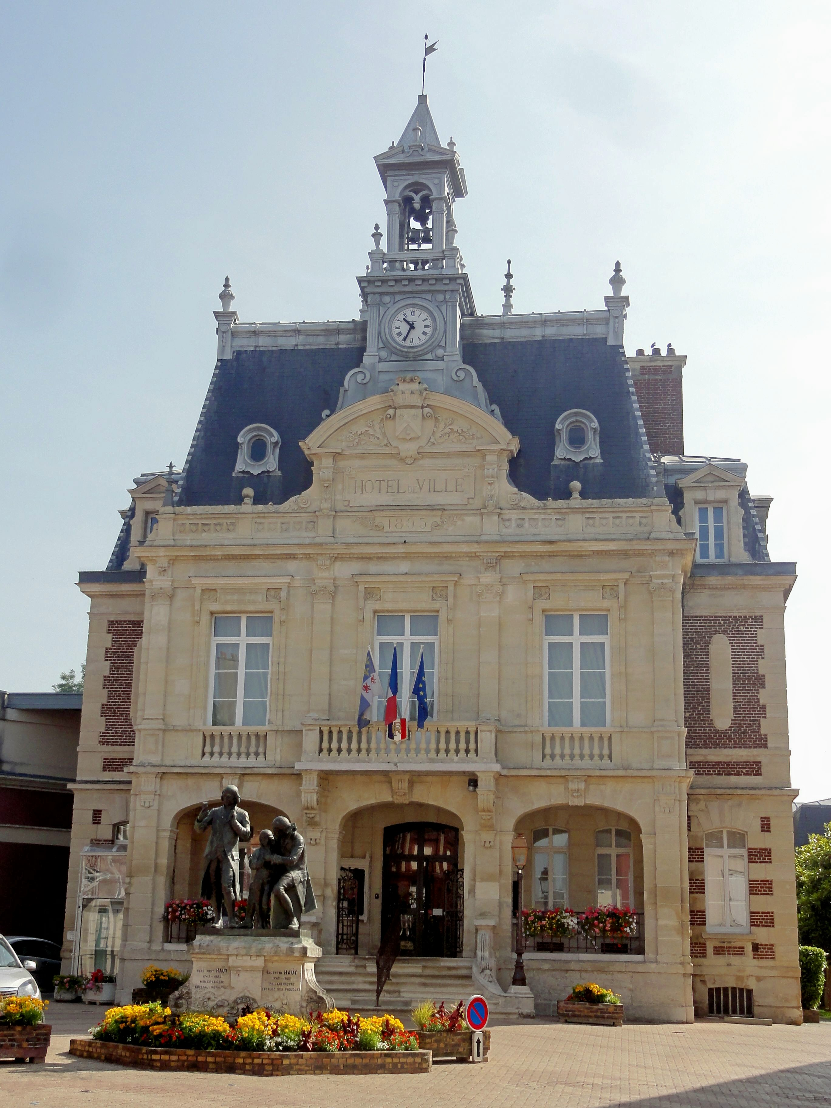 La mairie.